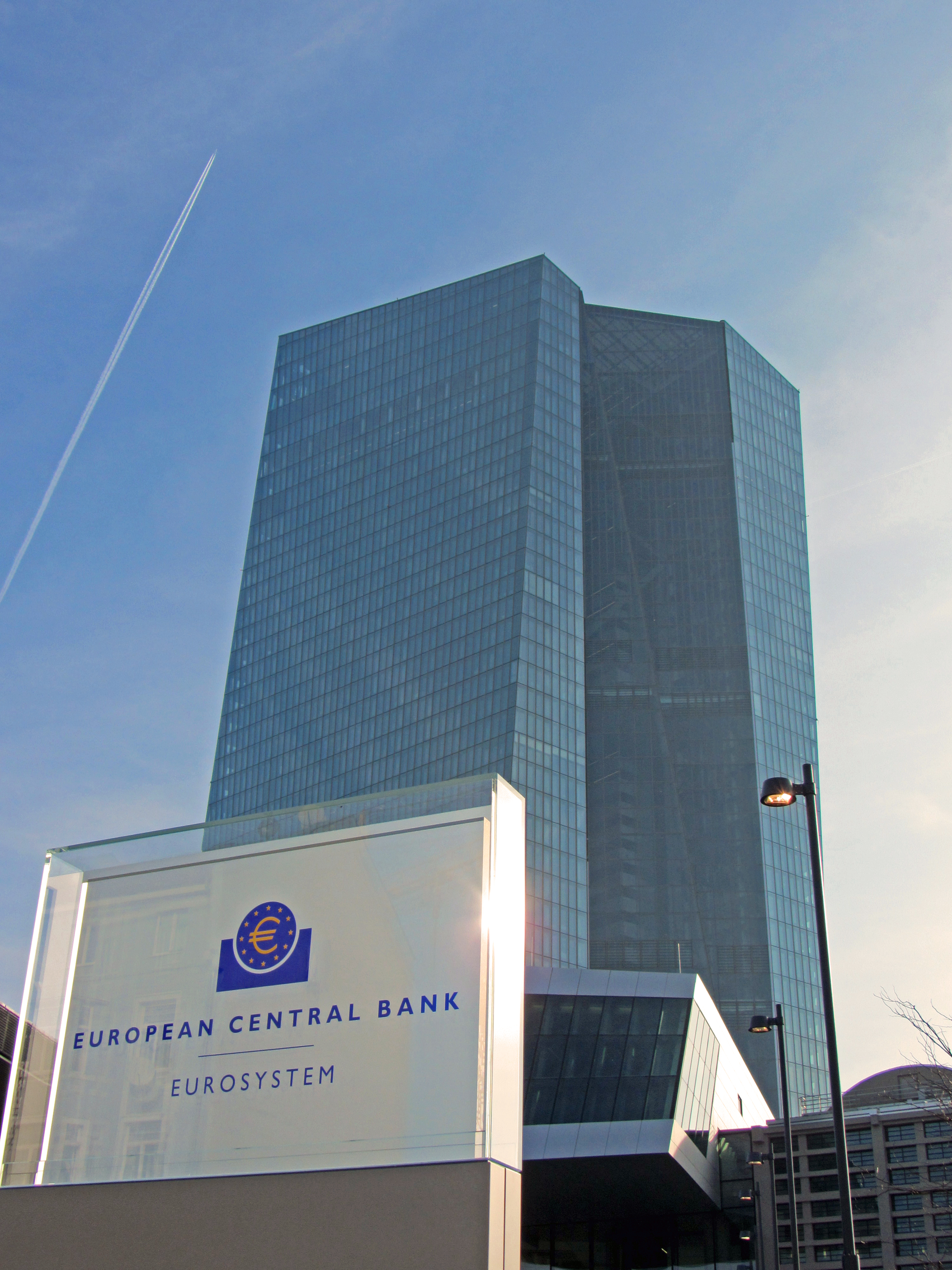 Neubau der Europäischen Zentralbank